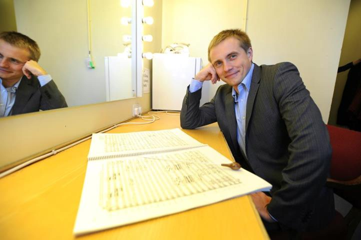 Vasily Petrenko